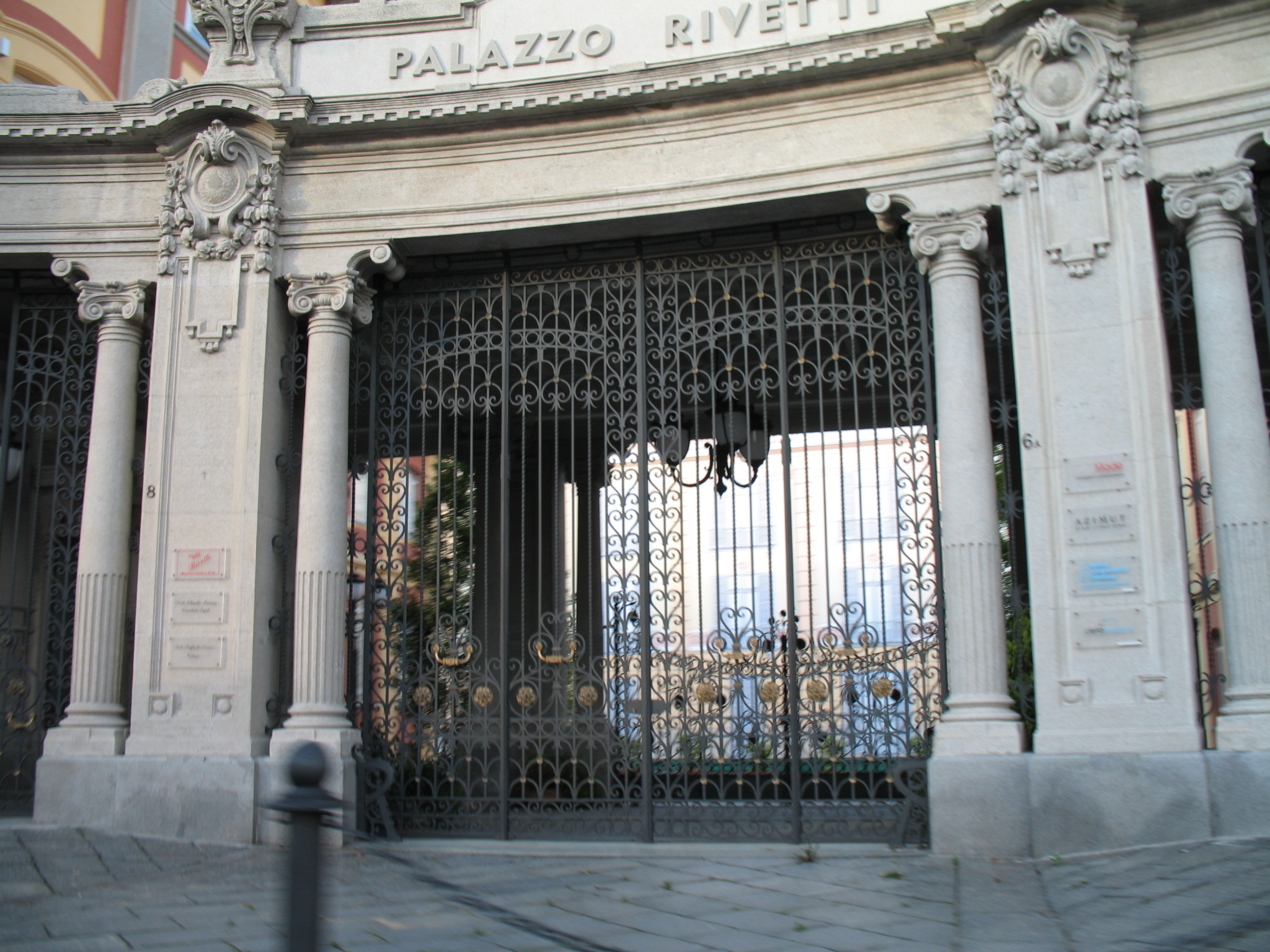 Immagine da Biella